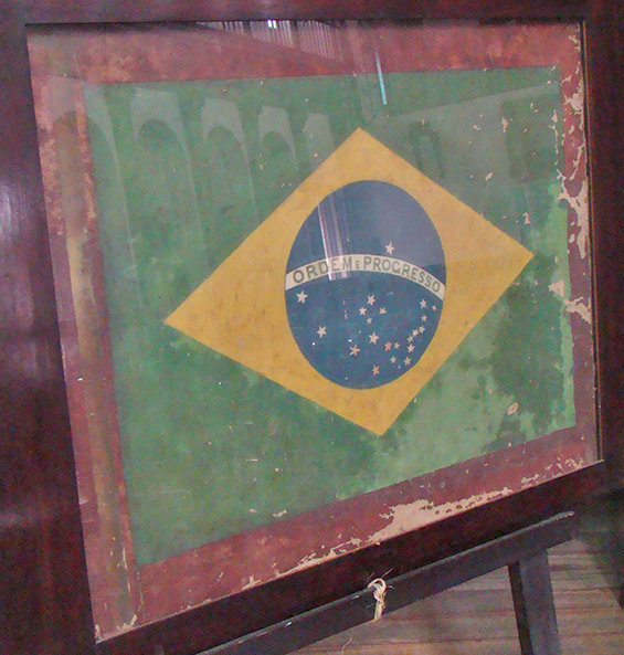 Protótipo da Bandeira Nacional do Brasil, por Décio Villares. A pintura que serviu de modelo para a confecção das primeiras bandeiras da República do Brasil. Pintura roubada em em 2010 da Igreja Positivista do Brasil.